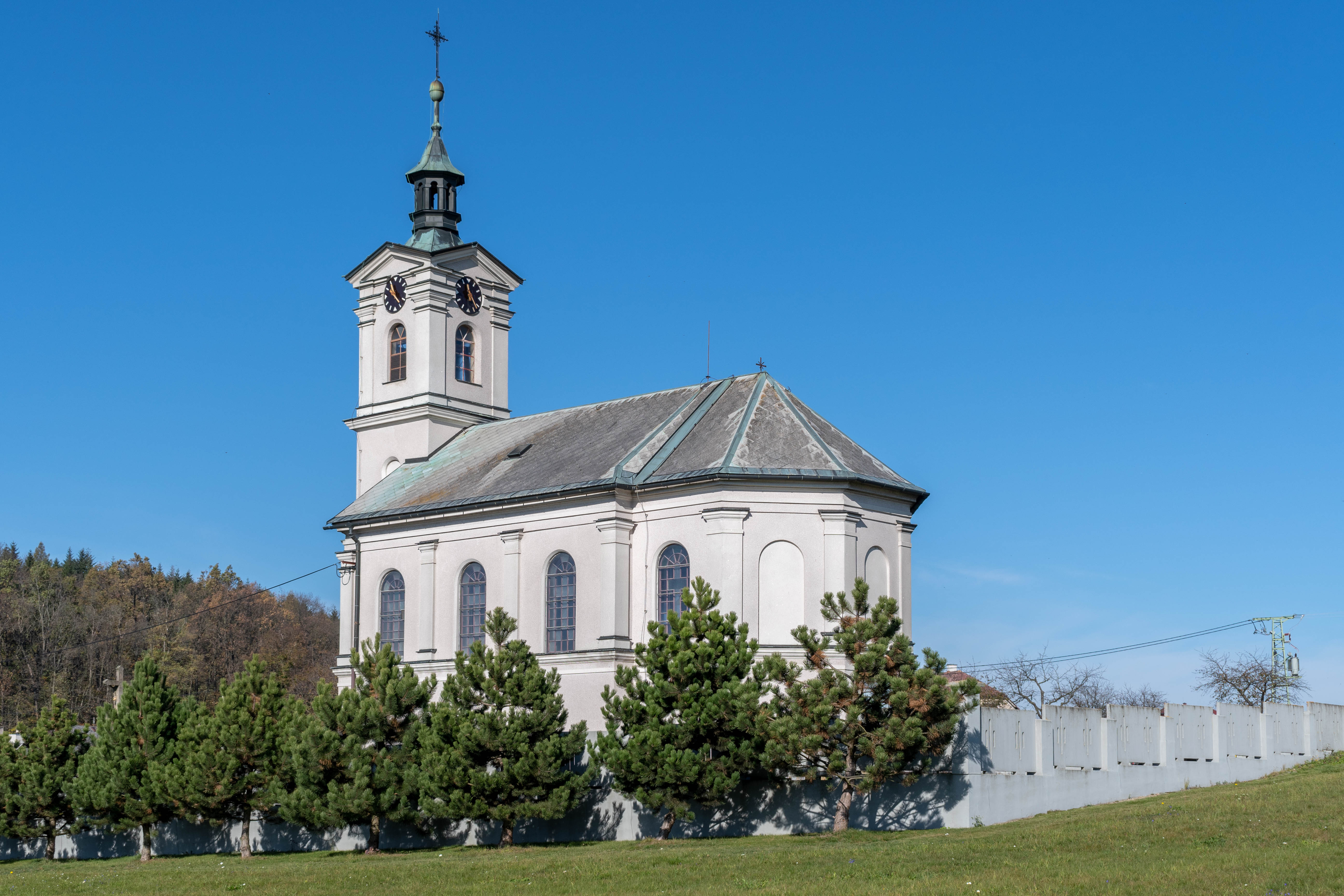 Kostel Nanebevzetí Panny Marie v obci Šedivec